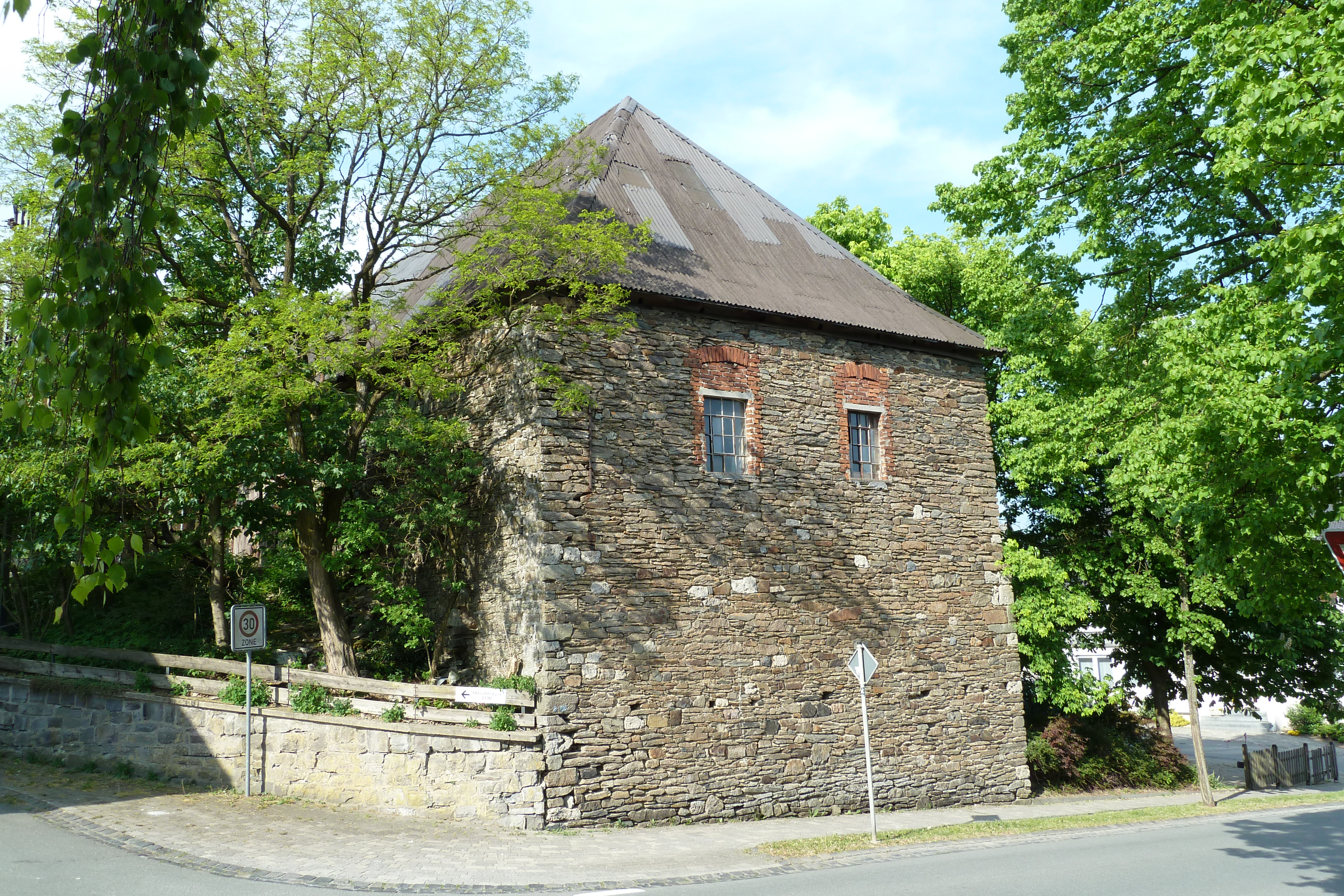 Marstall des ehemaligen Schlosses in Warstein-Hirschberg. Denkmalschutz seit 05. März 1986.